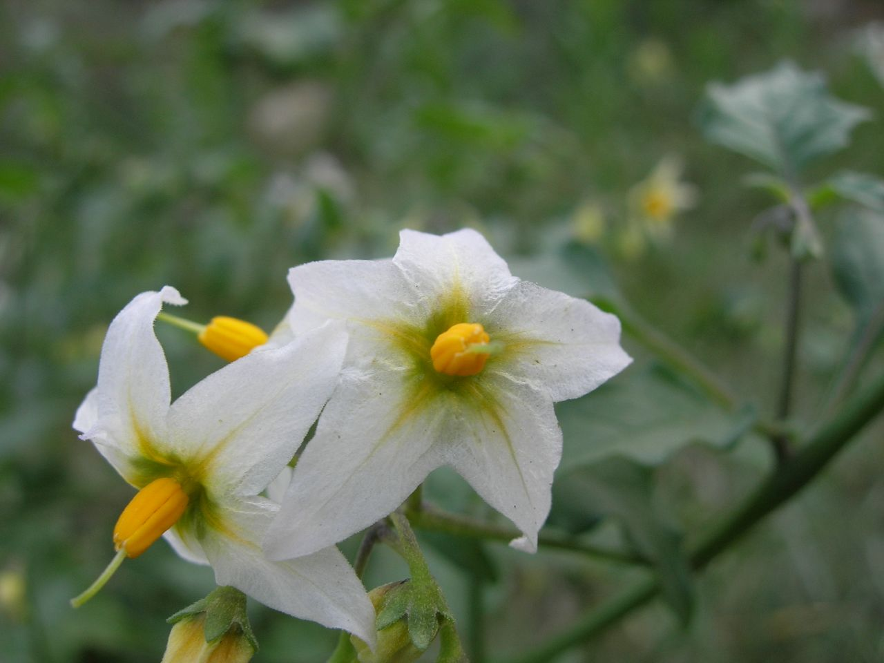 Solanum douglasii. El prieto canyon, pasadena, los angeles county, california